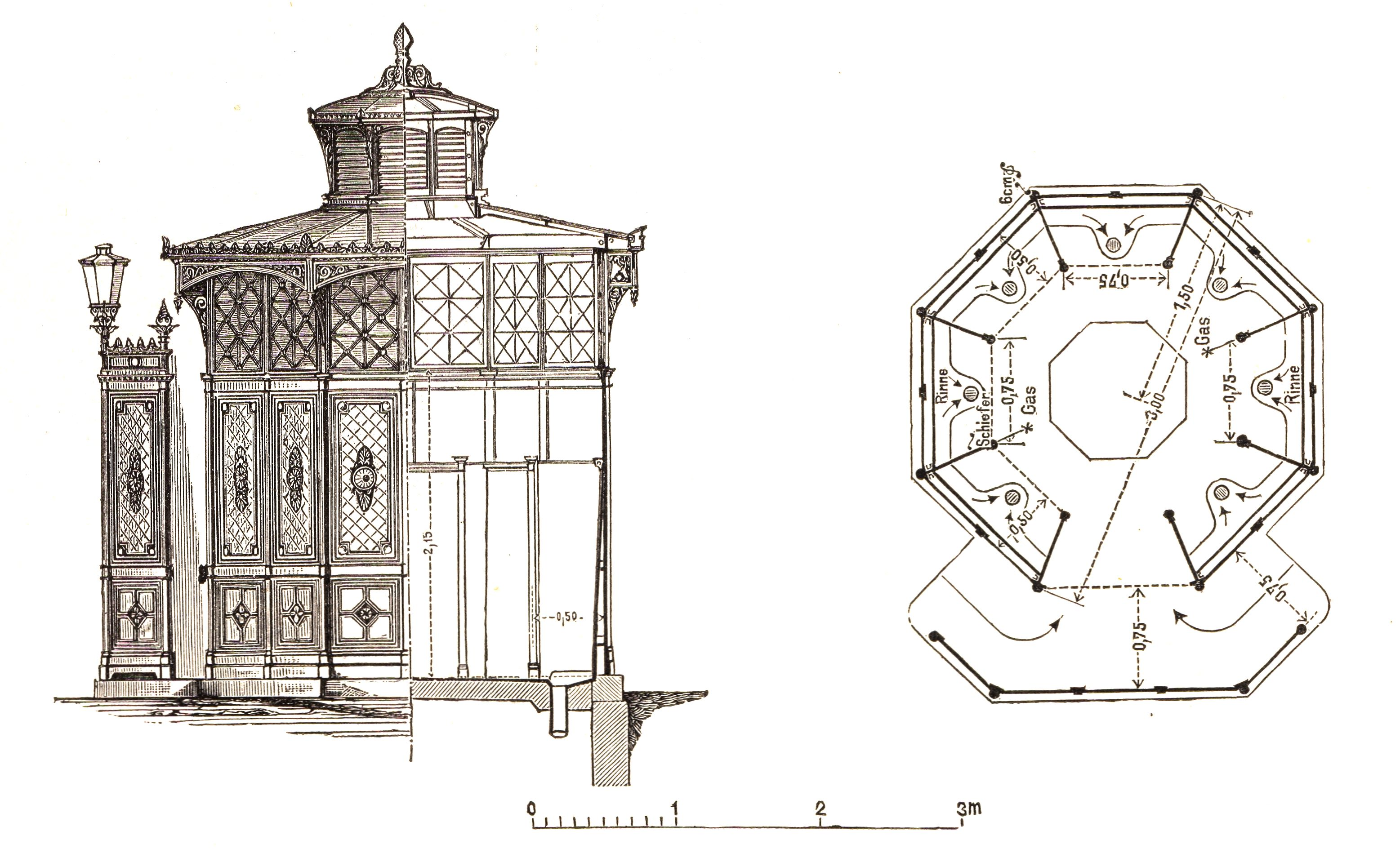 Berlin - Bedürfnisanstalt "Café Achteck", Aufriss/Schnitt und Grundriss